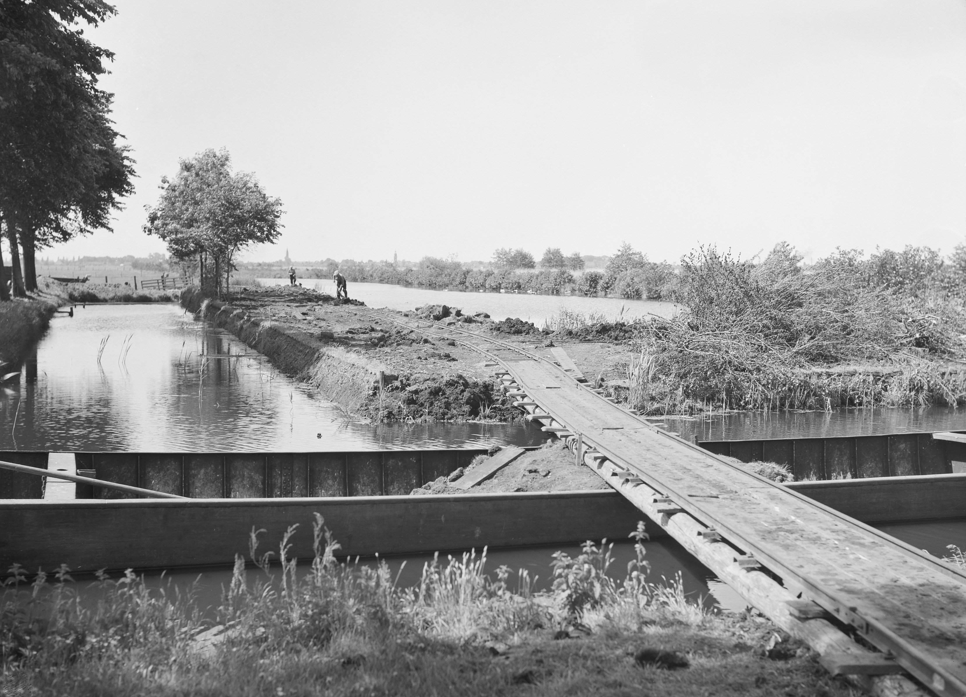 Collectie / Archief : Fotocollectie Nederlandse Heidemaatschappij Reportage / Serie : [ onbekend ] Beschrijving : ontginning, grondbewerking, egaliseren, bezanden, Haskerveenpolder Datum : mei 1952 Locatie : Haskerveenpolder Trefwoorden : bezanden, egaliseren, grondbewerking, ontginning Instellingsnaam : Drie Provinciën, De Fotograaf : [onbekend] Auteursrechthebbende : Nationaal Archief Materiaalsoort : Negatief (zwart/wit) Nummer archiefinventaris : bekijk toegang 2.24.06.02 Bestanddeelnummer : 159-0080